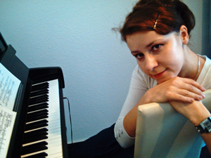 Foto von Irina Emeliantseva